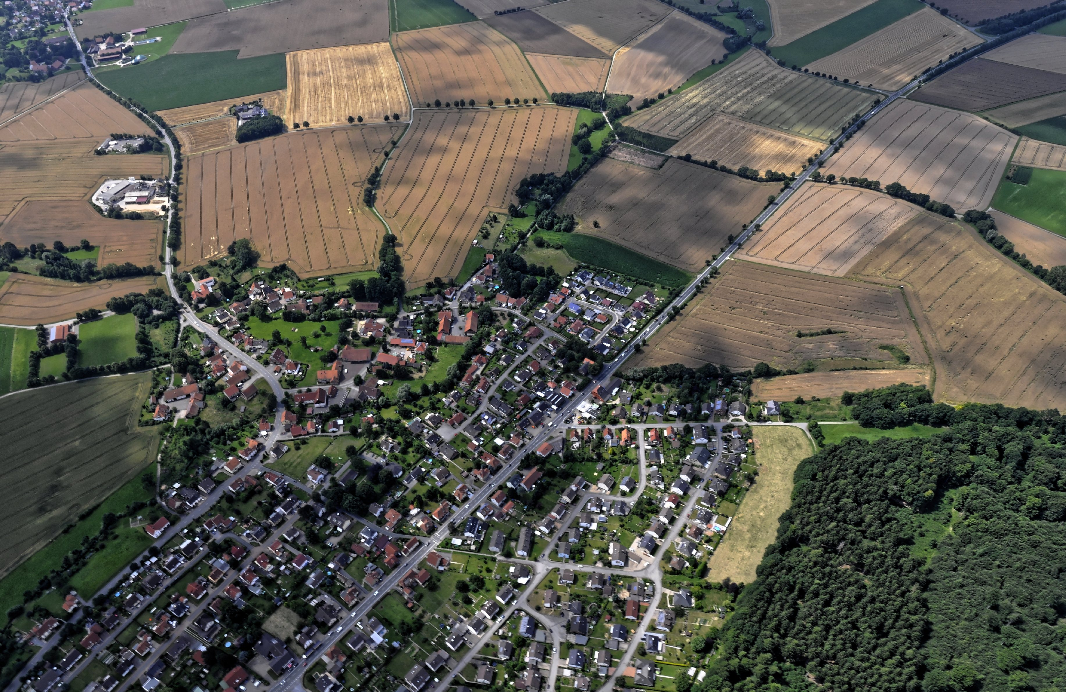 Bilder vom Flug Nordholz-Hammelburg 2015: Istrup